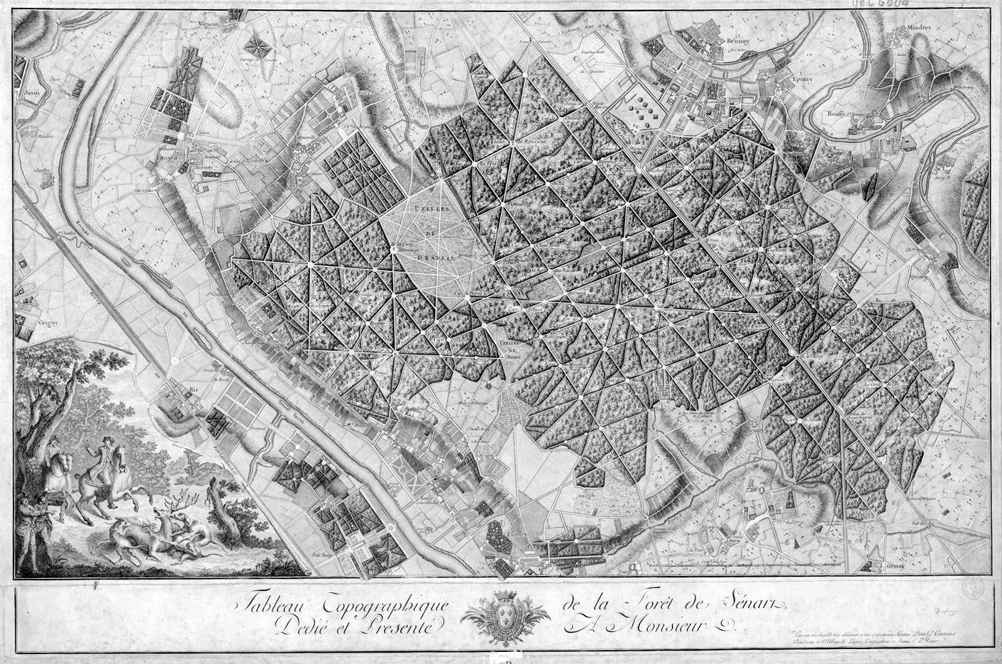 image issue de Gallica